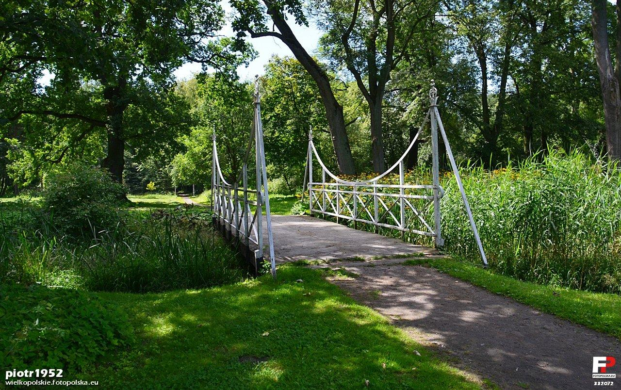 Jeden z mostków na terenie parku - jest ich tam dość dużo